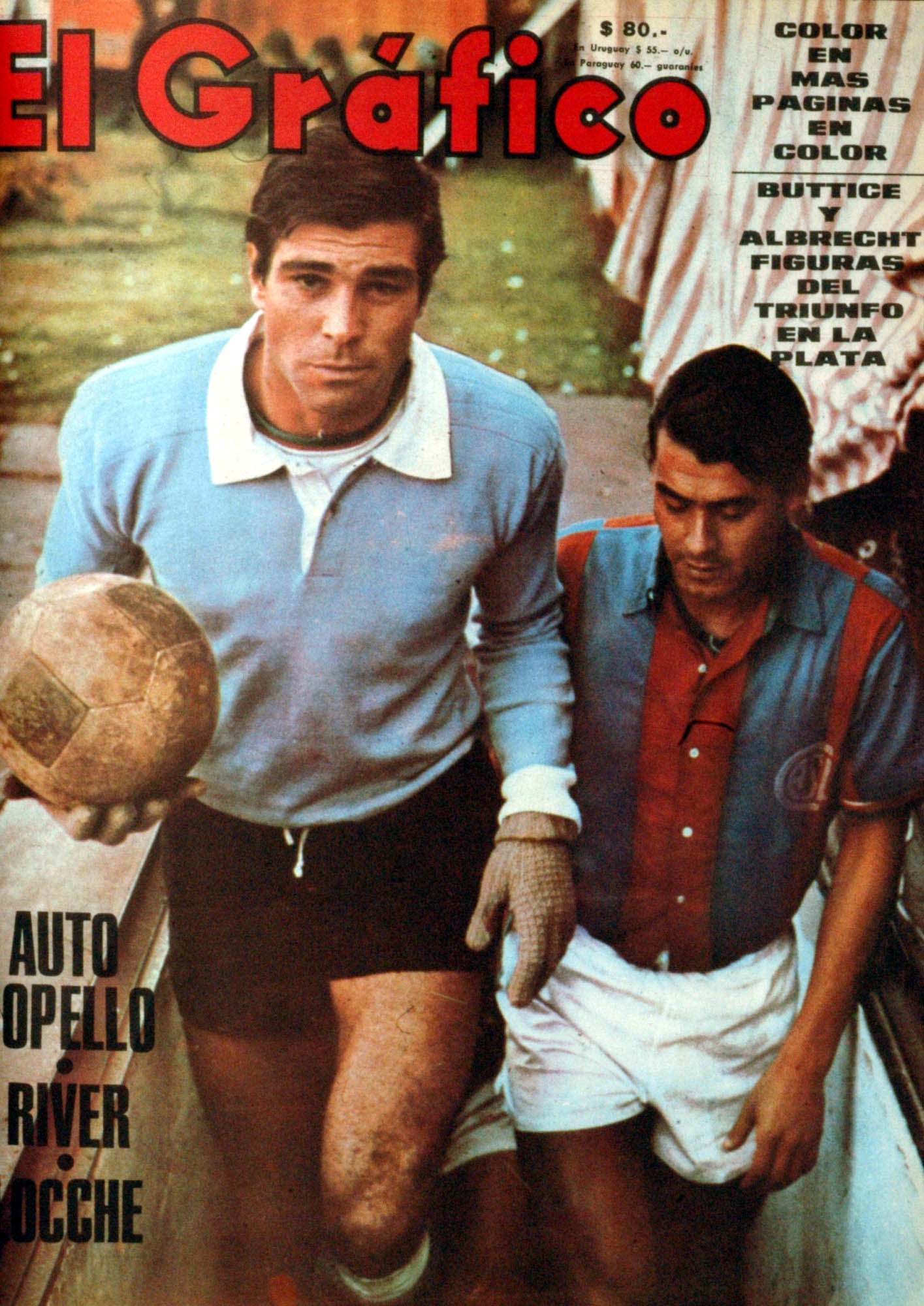 El Grafico del 11 de Junio de 1968. Edicion 2540